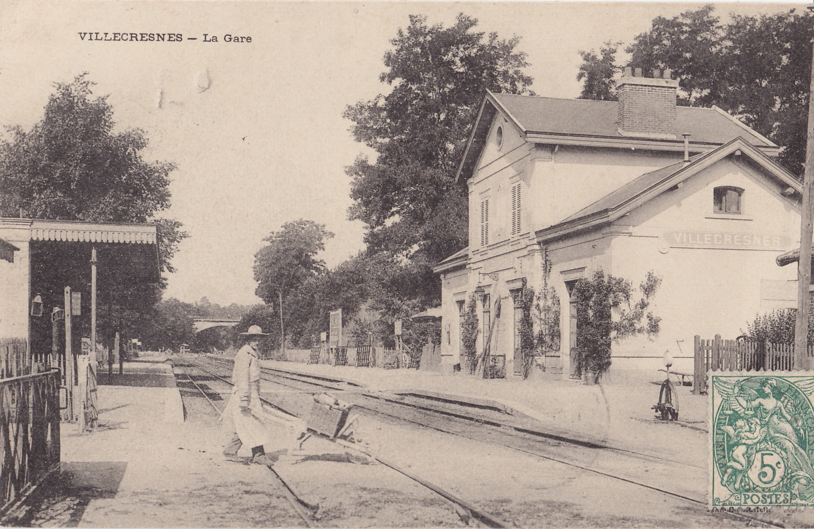 Carte postale ancienne sans mention d'éditeur : VILLECRESNES - La Gare